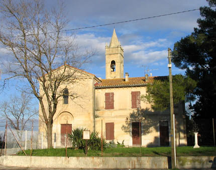 Eglise d'Albaron, comme d'Arles (Bouches-d-Rhône, France)